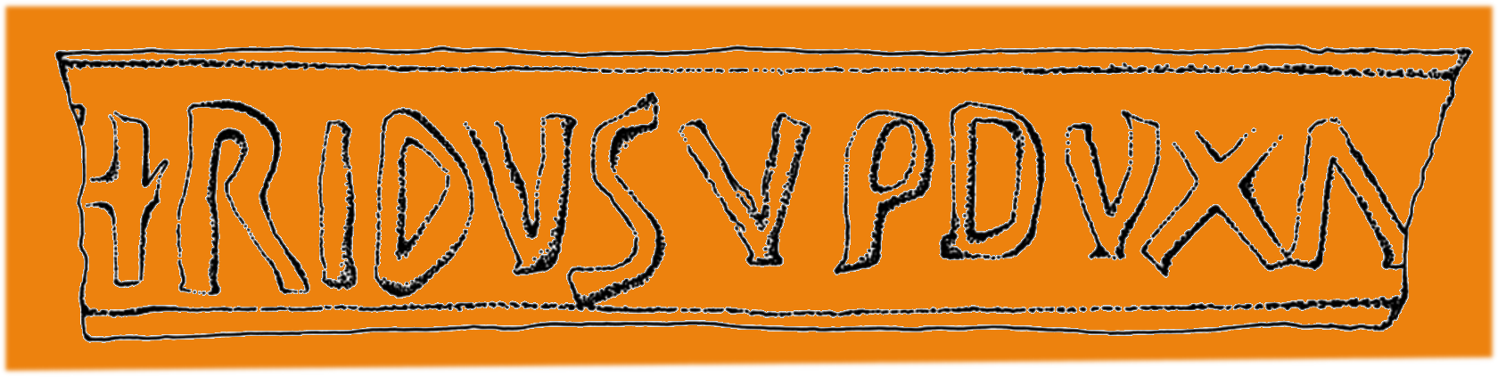 Römischer Ziegelstempel des Dux Frigeridus (Amtszeit 370-373) aus dem Burgus von Tahitótfalu-Balhavár (HU)